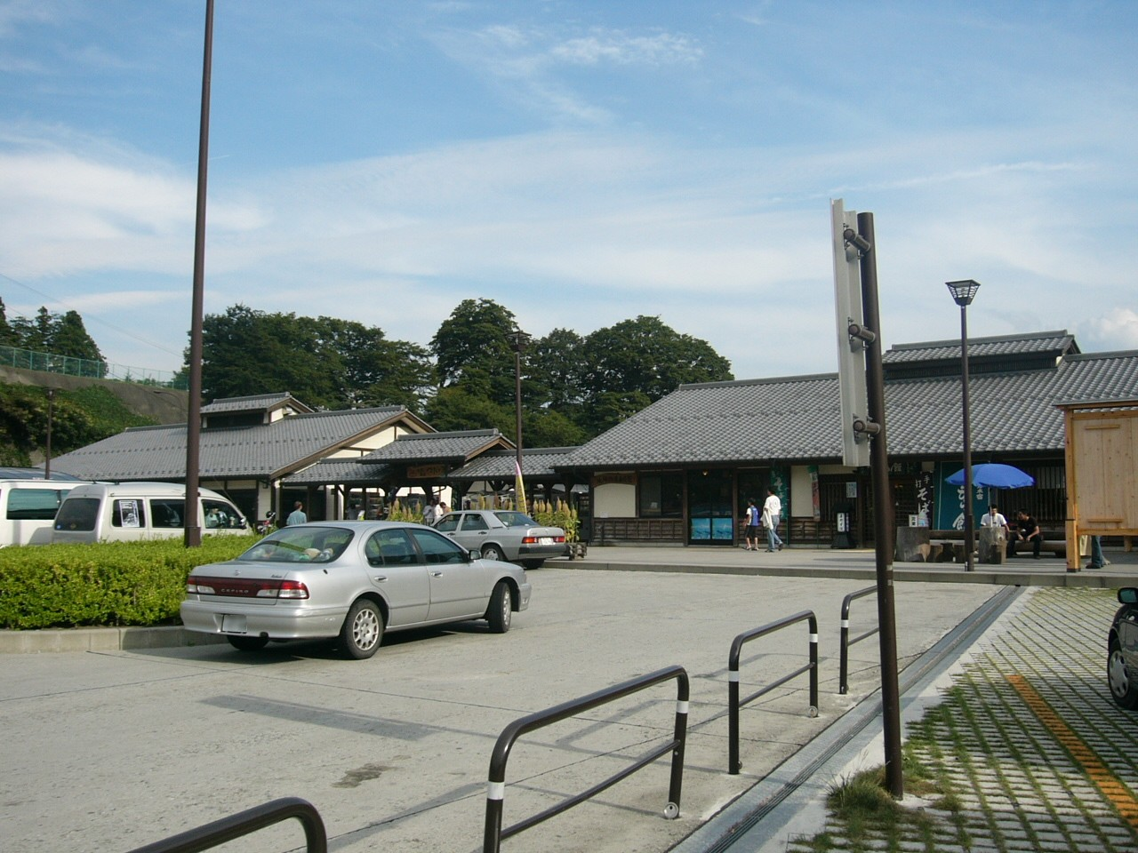 Michinoeki Shinshu Tsutakijuku (道の駅信州蔦木宿 Nagano)